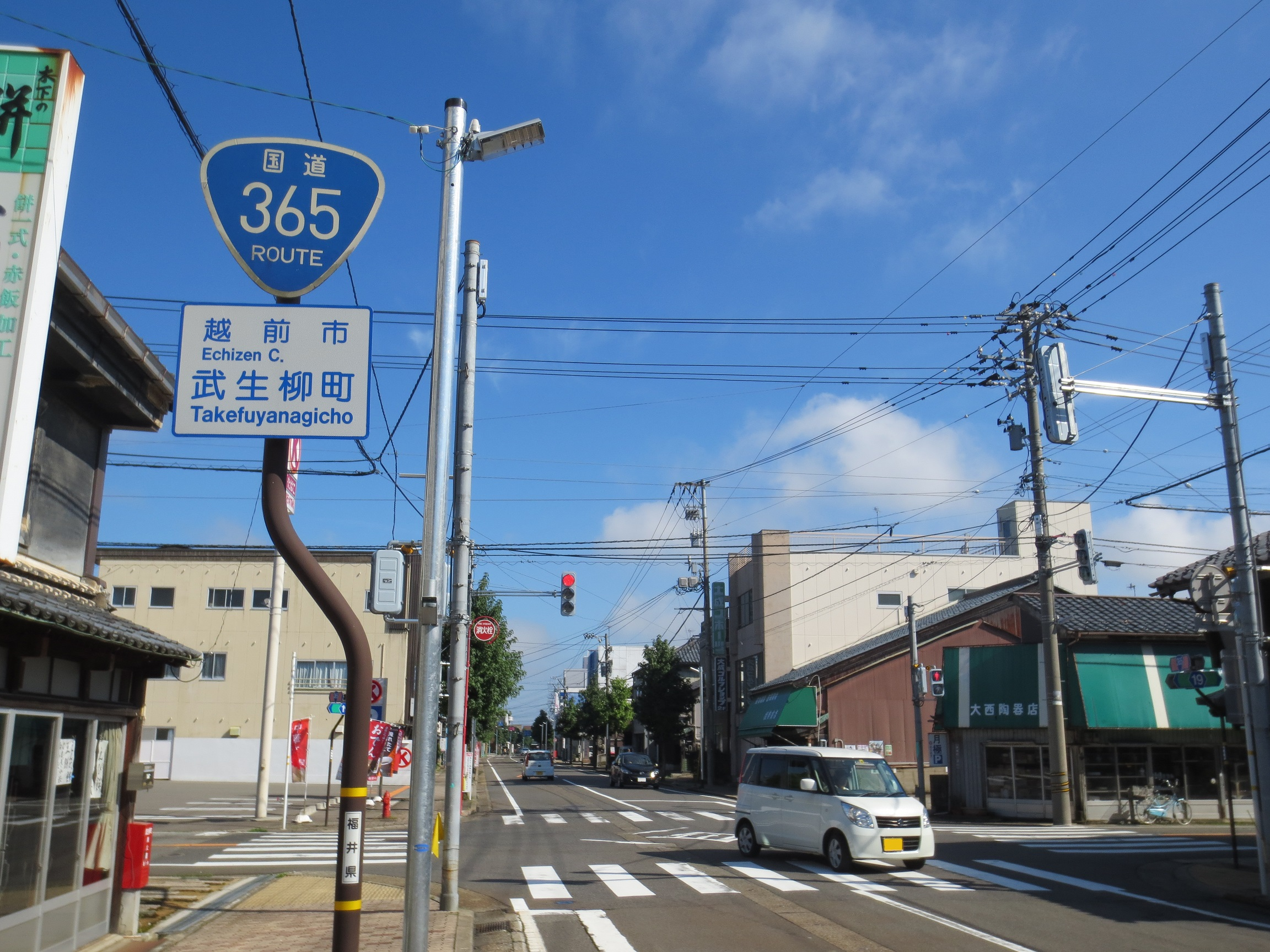 越前市武生柳町付近の国道365号。